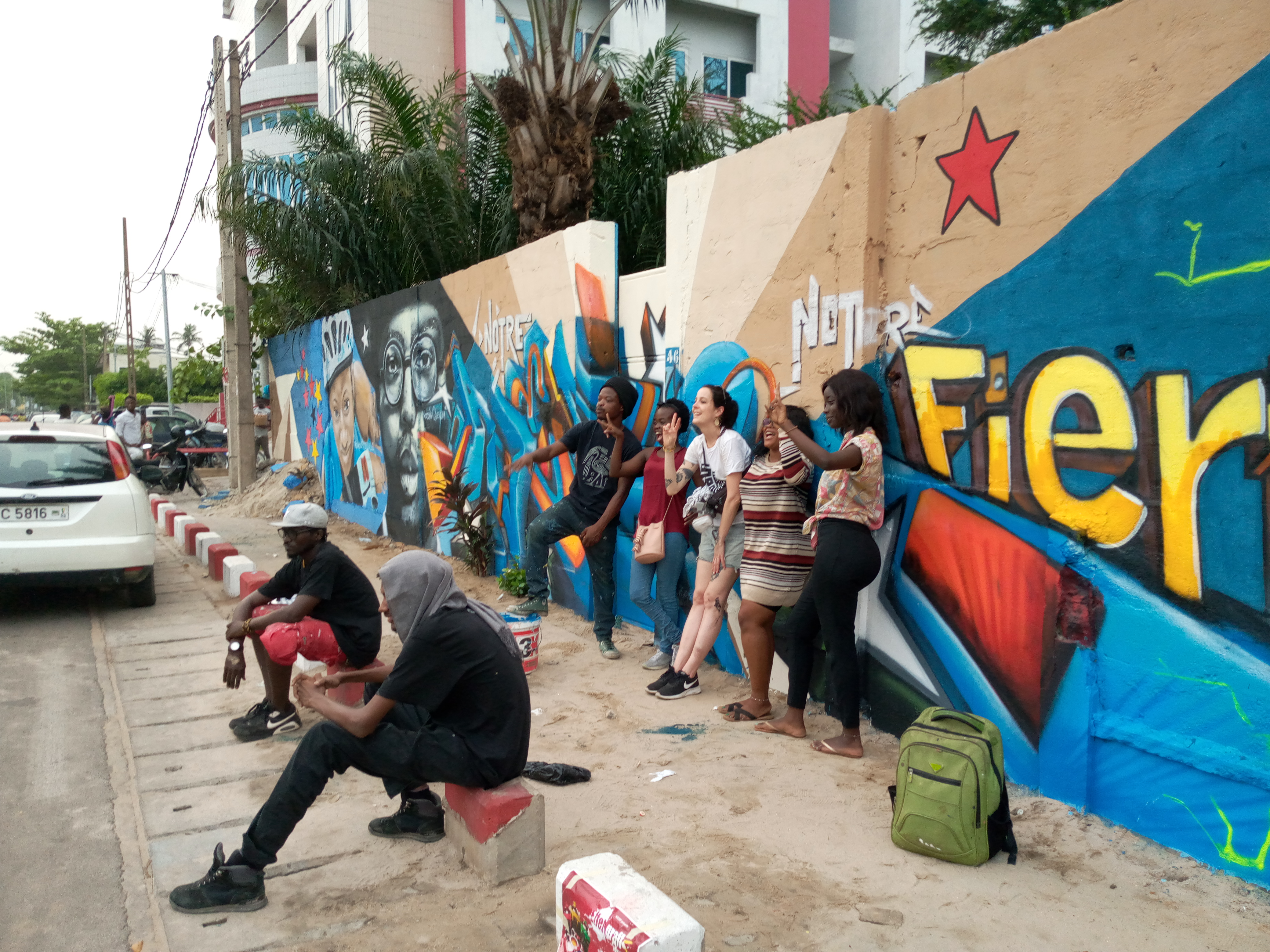 Equipe Effet Graff5 après performances en face de la place du souvenir